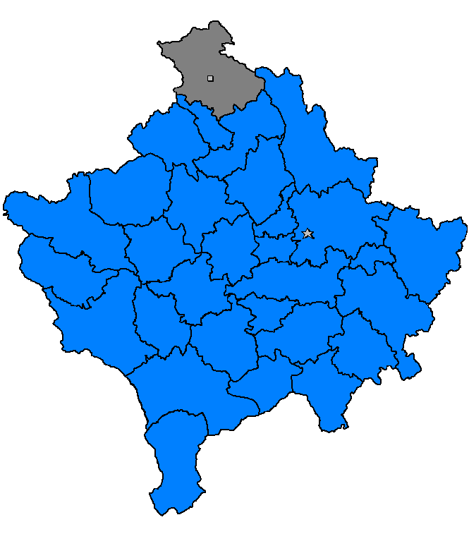 Albaniku, Kosovë 2006